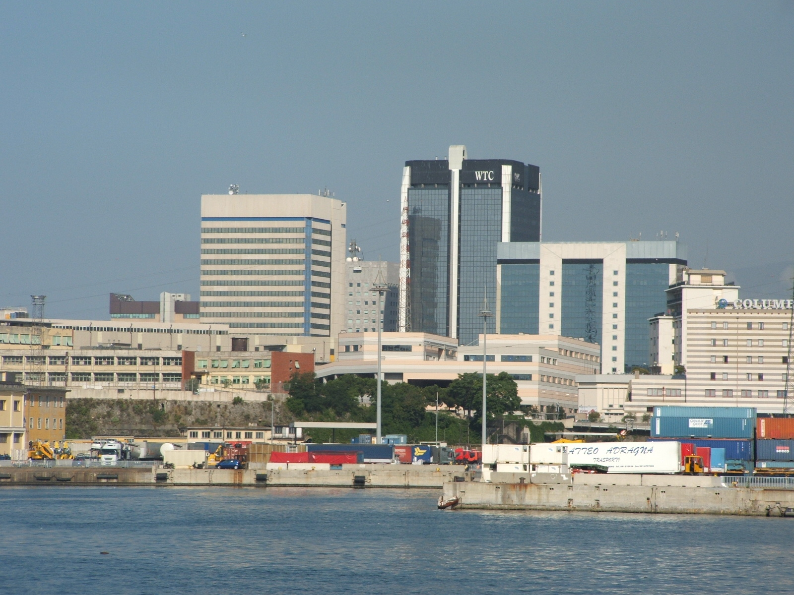 Immagine dal porto antico di Genova, Italia: torre del WTC e altri grattacieli di Sampierdarena.